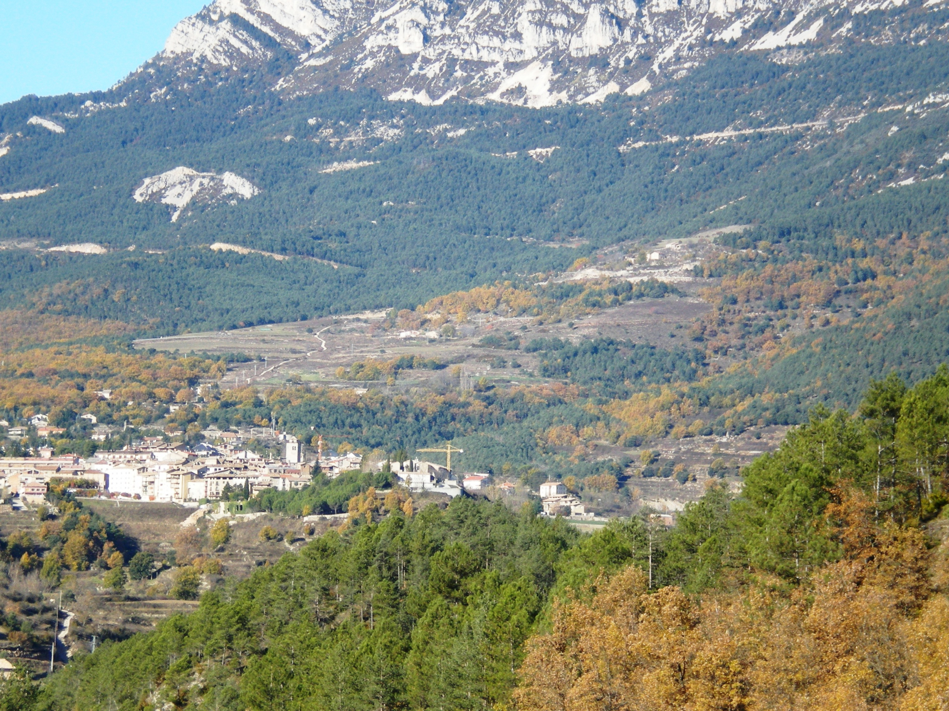 La part superior del curs del torrent de Pou es vislumbra a la part dreta de la foto baixant en diagonal cap a la vila de Sant Llorenç de Morunys.